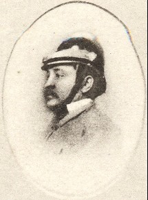 Franz Vollgruber (1847-1917), rakouský a český pedagog a politik